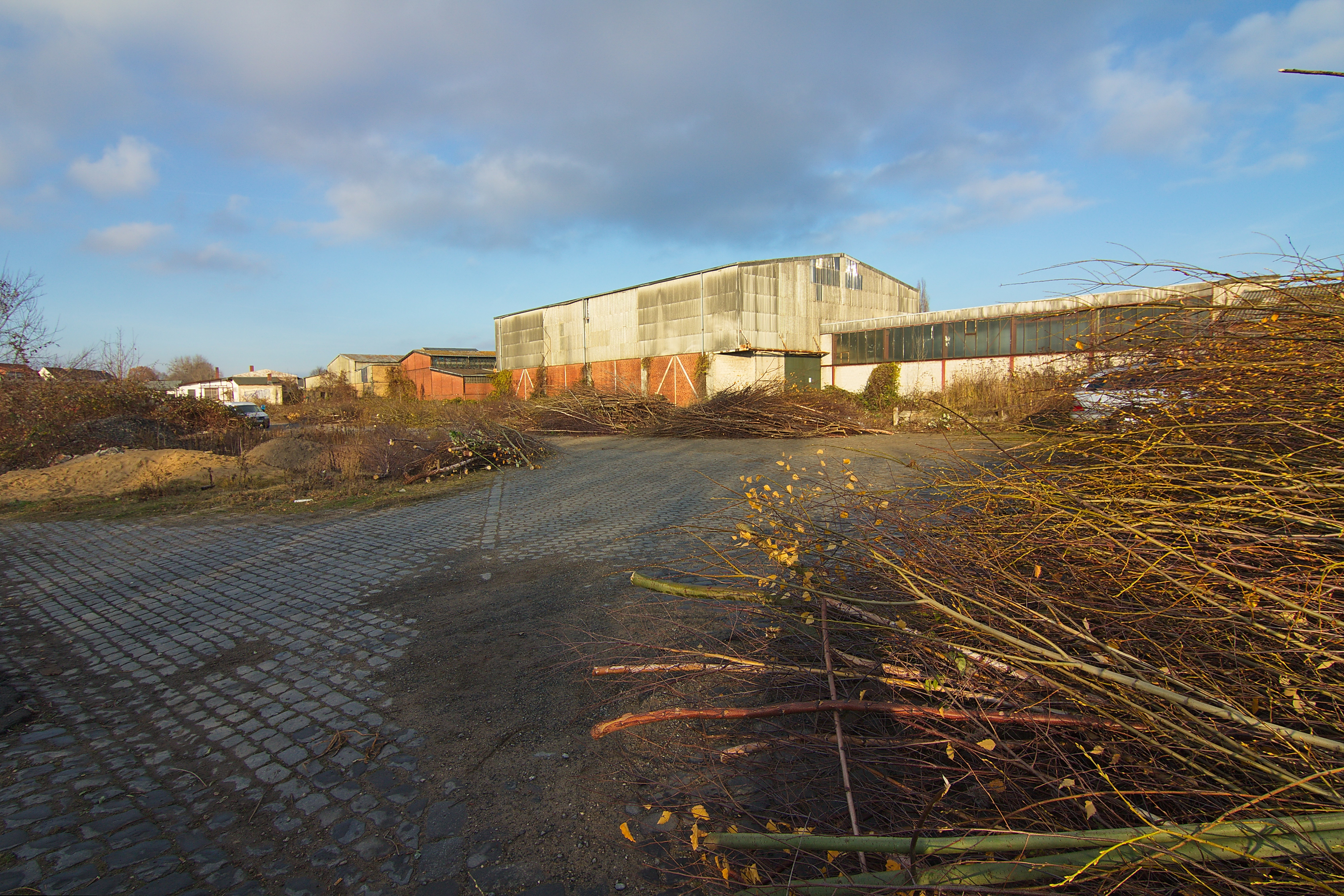 Gelände Am Südbahnhof (Hannover), Niedersachsen, Deutschland